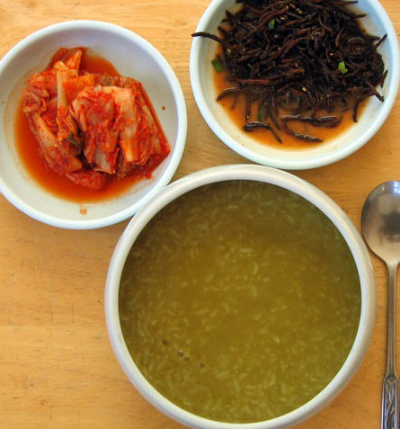 Jeonbokjuk, Korean abalone porridge